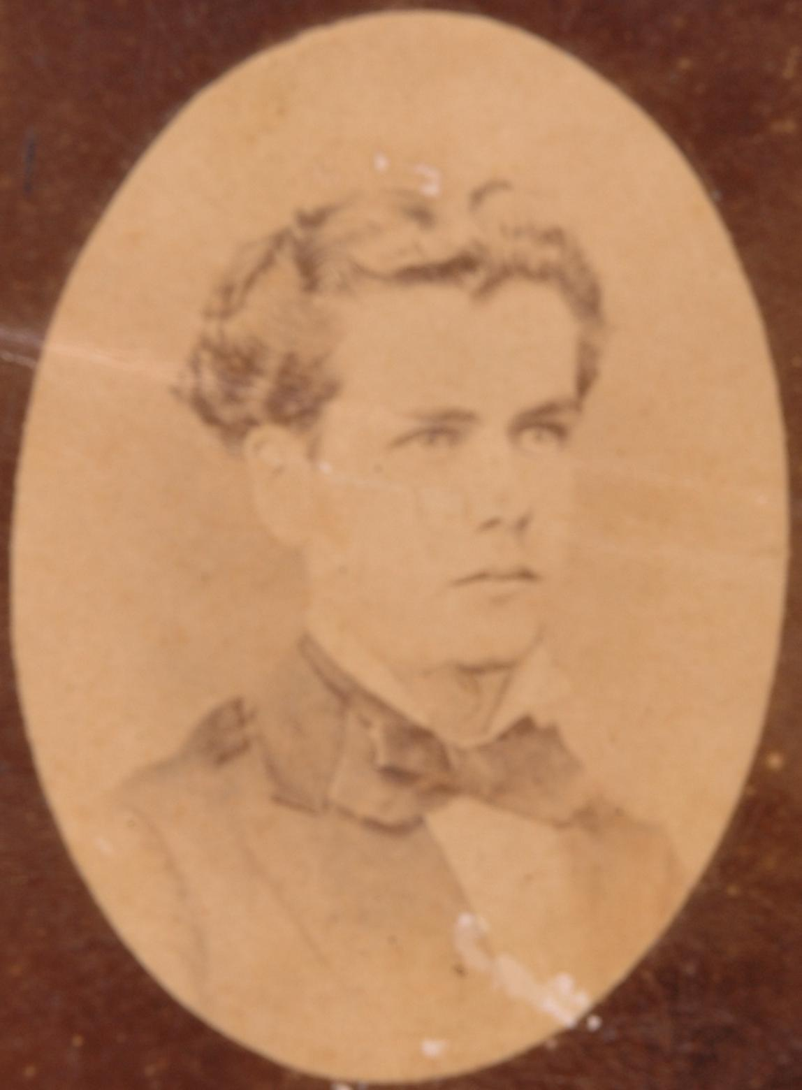 Francisco de Assis da Rosa e Silva, bacharel em 1877, Governador de Pernambuco e Ministro do Império.